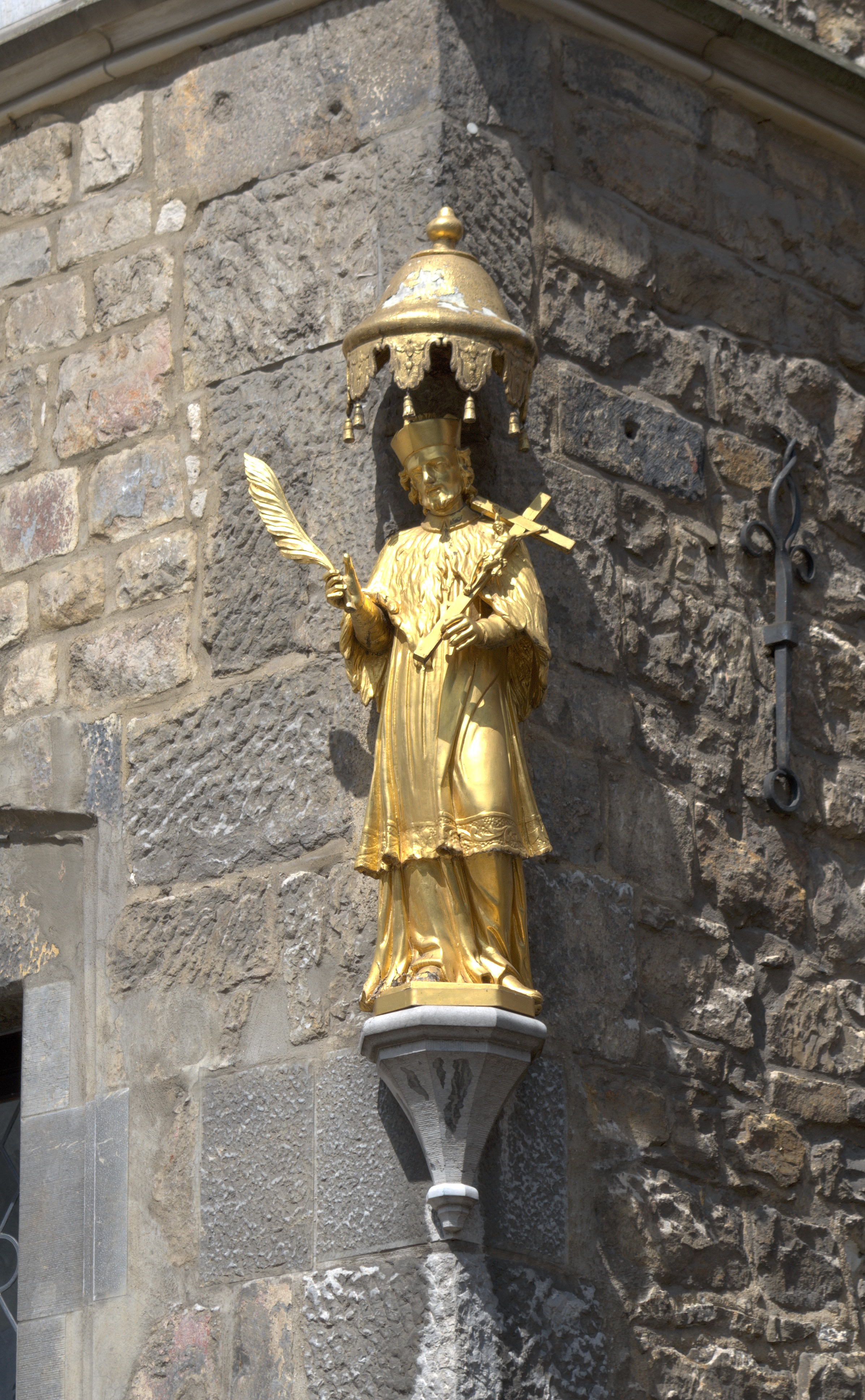 Aachen, Markt 41, Haus Löwenstein. Statue des Hl. Nepomuk